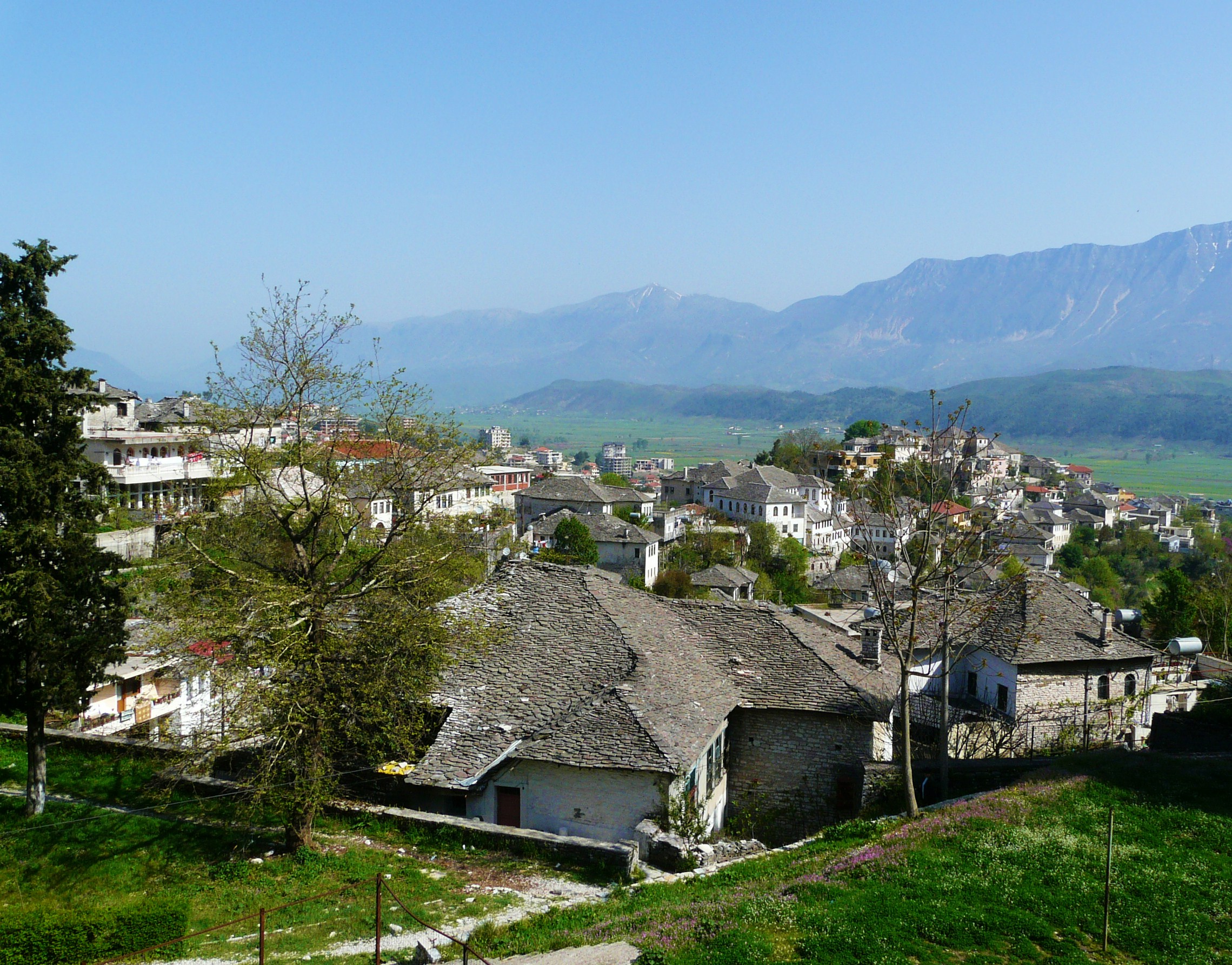 Gjirokastër